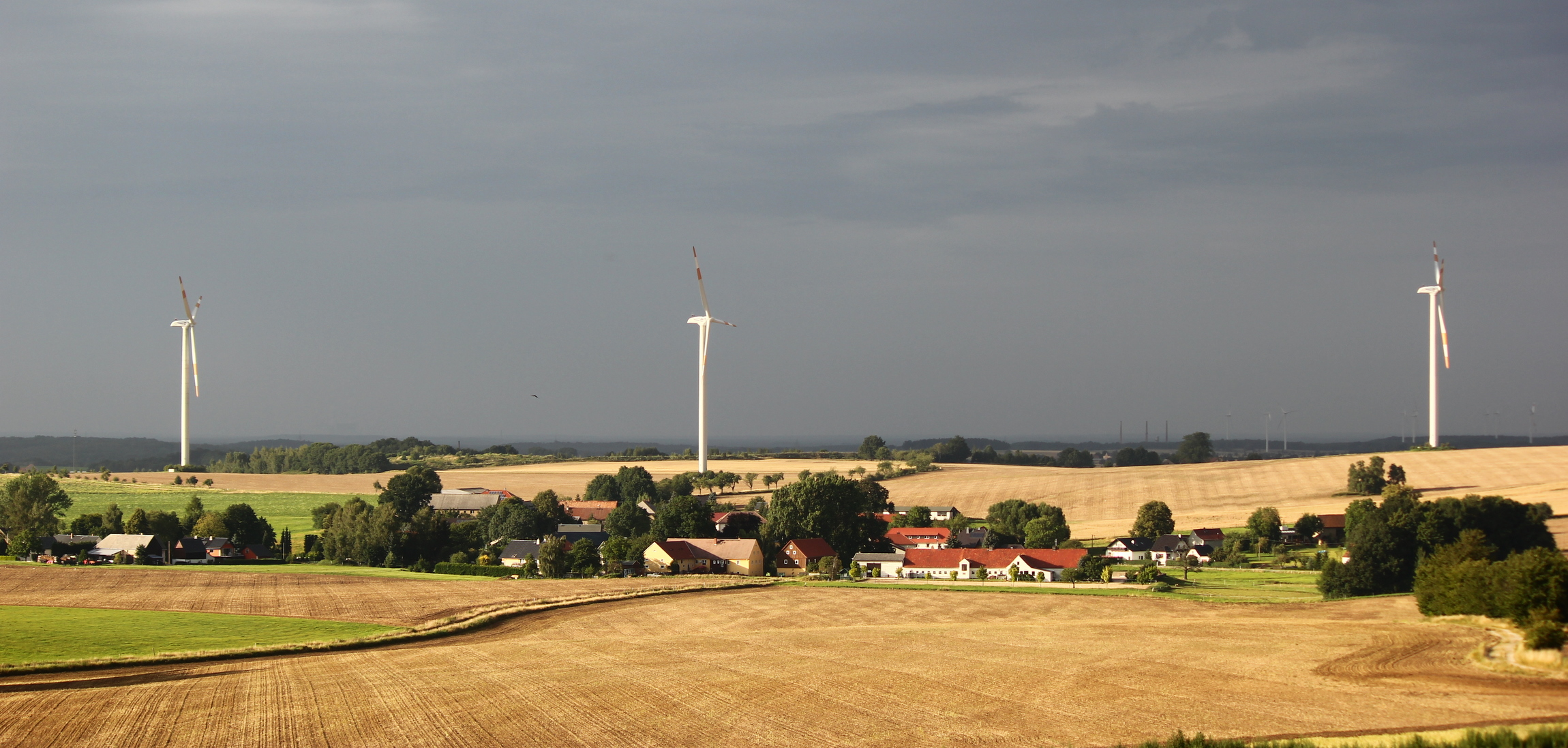 Blick von Süden auf den Ort Großhänchen (Gemeinde Burkau) im Landkreis Bautzen, Sachsen. Hornjoserbsce: Napohlad Wulkeho Wosyka z juha.